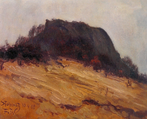 Karge Landschaft bei Stolzenburg. Öl auf Leinwand, 37 x 45 cm, bezeichnet, datiert und monogrammiert »Stolzenbg 10.4.08 F. v. W.«